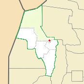 Mapa de la Ubicación de la Ciudad Cabecera del Departamento Cruz del Eje en su pedania homónima.